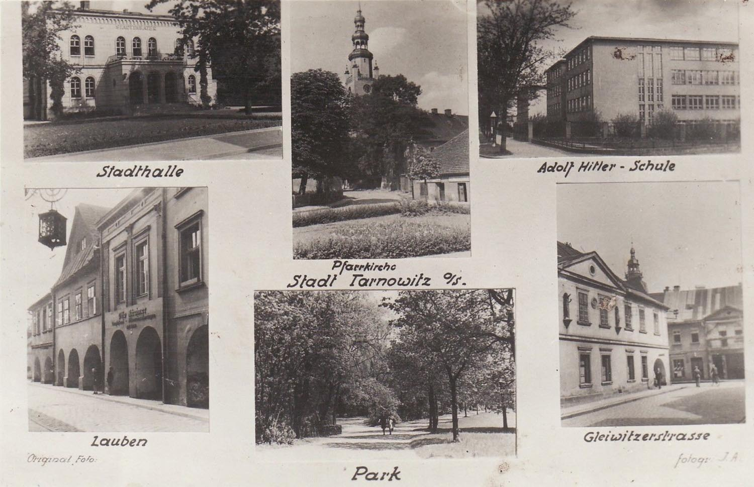 Widokówka z Tarnowskich Gór (1944)